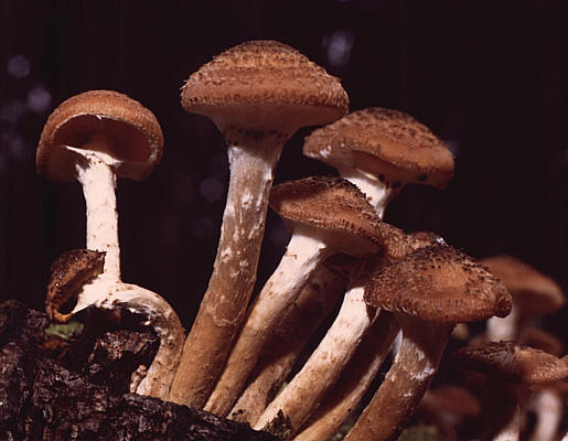 Armillaria ostoyae, Hallimasch